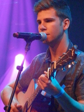 Stef Classens, winnaar van seizoen 3 van De beste singer-songwriter van Nederland